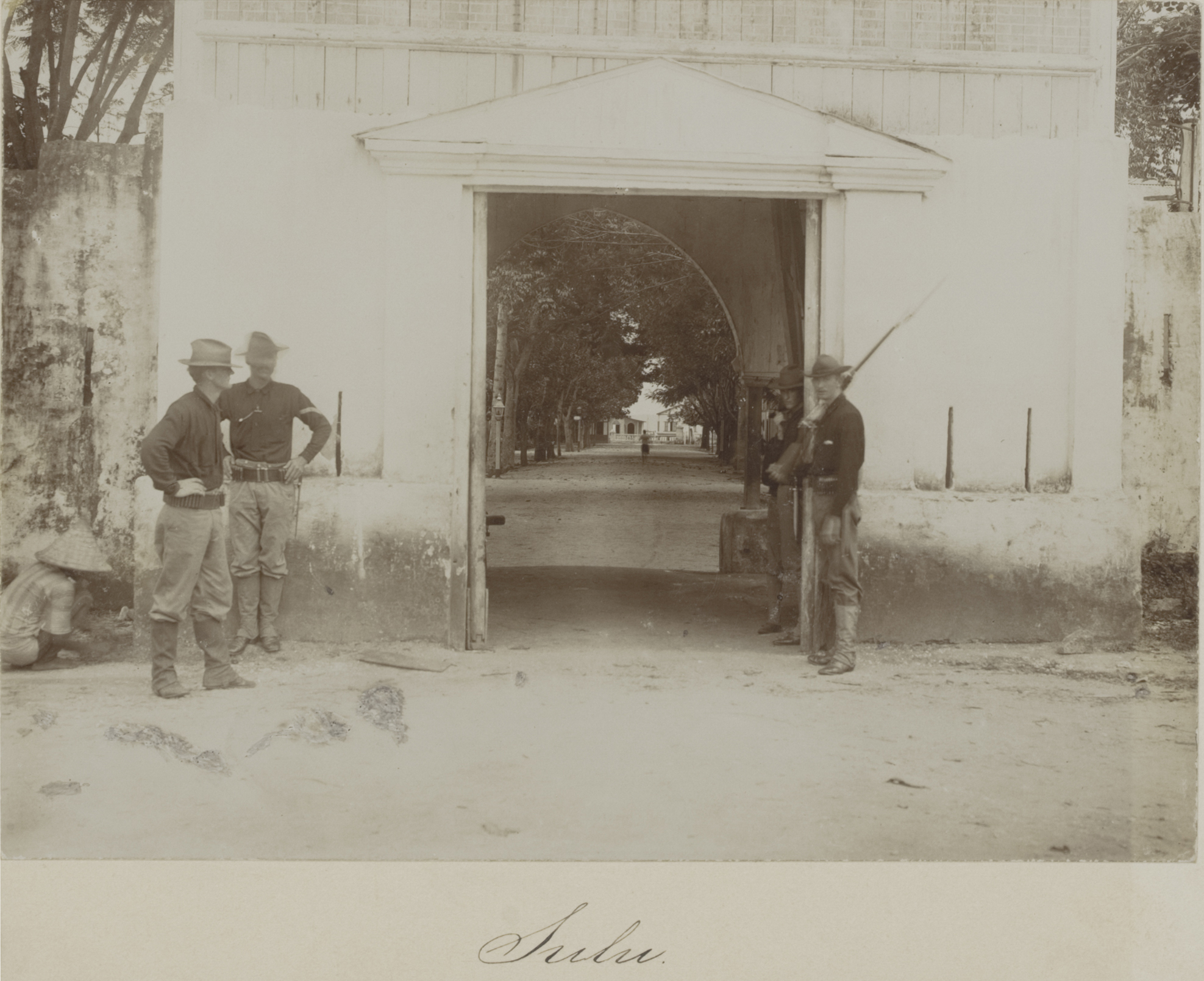 Academische Collecties: 1899-1900, Siboga-expeditie naar Nederlands Oost-Indië, onder leiding van Max Wilhelm Carl Weber Stenen toegangspoort tot het fort. Voor de poort staan Amerikaanse soldaten, die het eiland na de Spaans-Amerikaanse oorlog van 1898 hadden bezet.